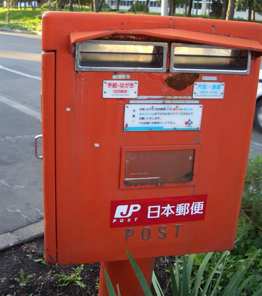 日本郵便のステッカーが貼り付けられた郵便ポスト。